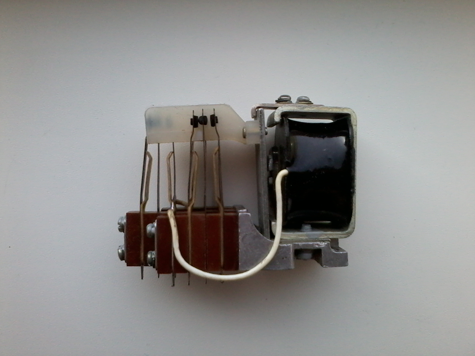 Знято мобілкою Самсунг